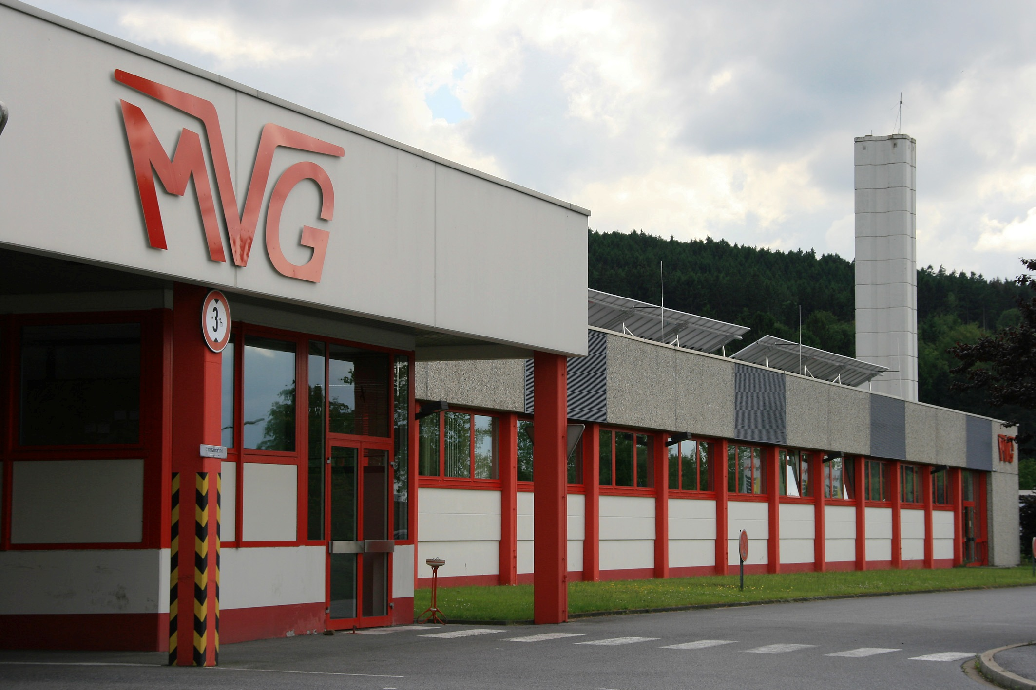 Betriebsstelle Märkische Verkehrsgesellschaft GmbH Iserlohn-Calle mit Photovoltaik-Anlage